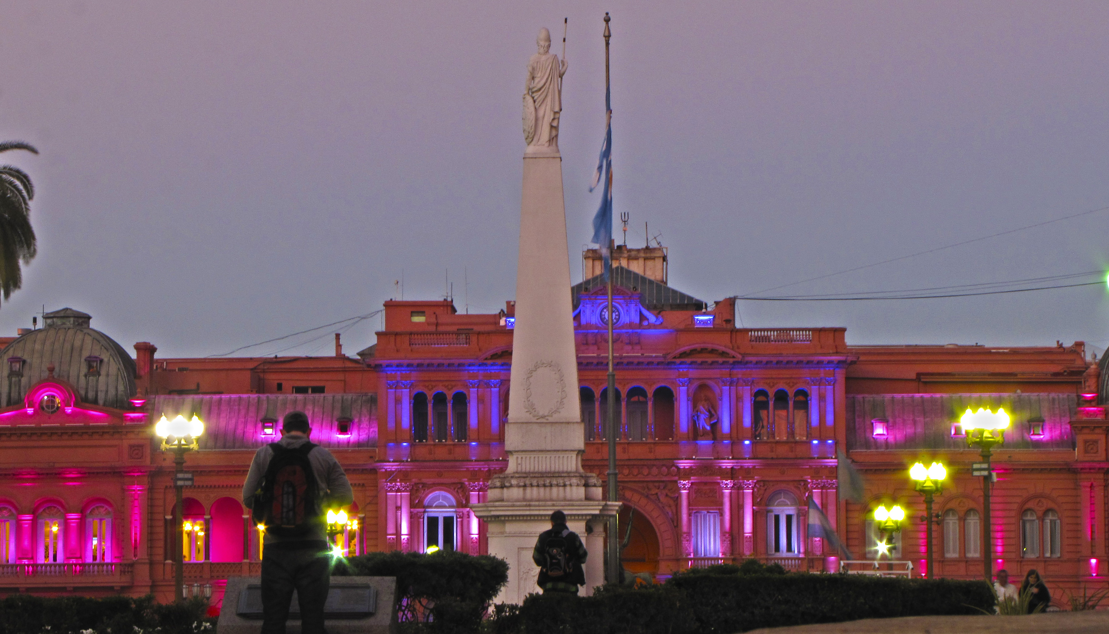 Casa Rosada Iluminada